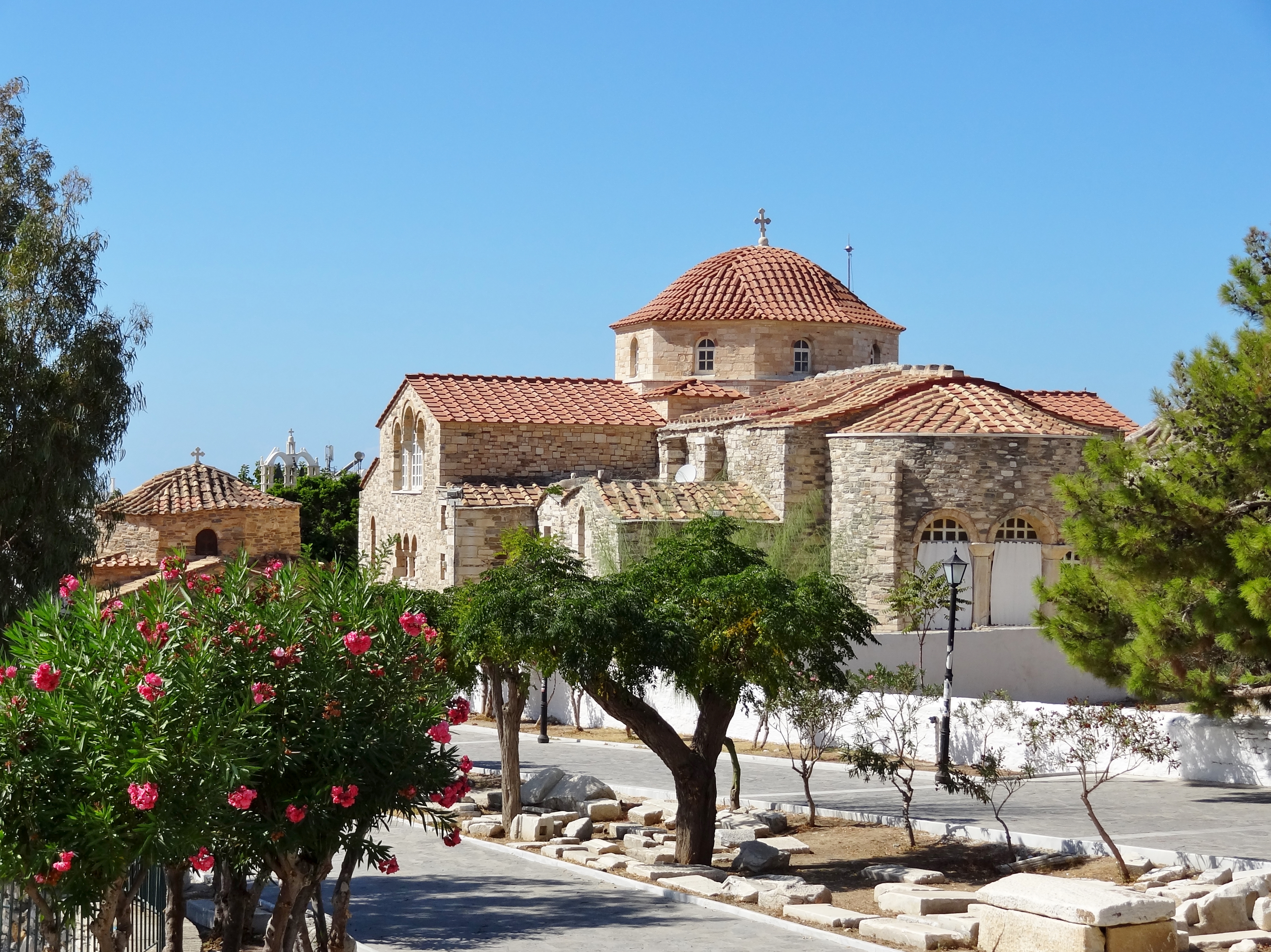 Panagia Ekatontapyliani in Parikia auf Paros, Kykladen, Griechenland